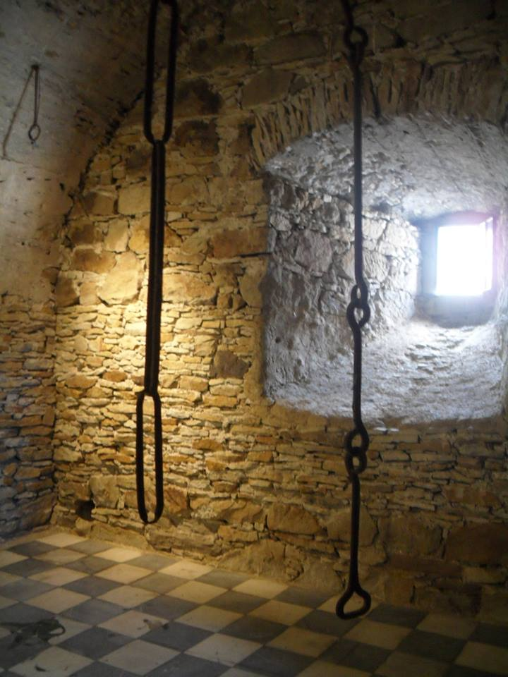 Přízemí věže